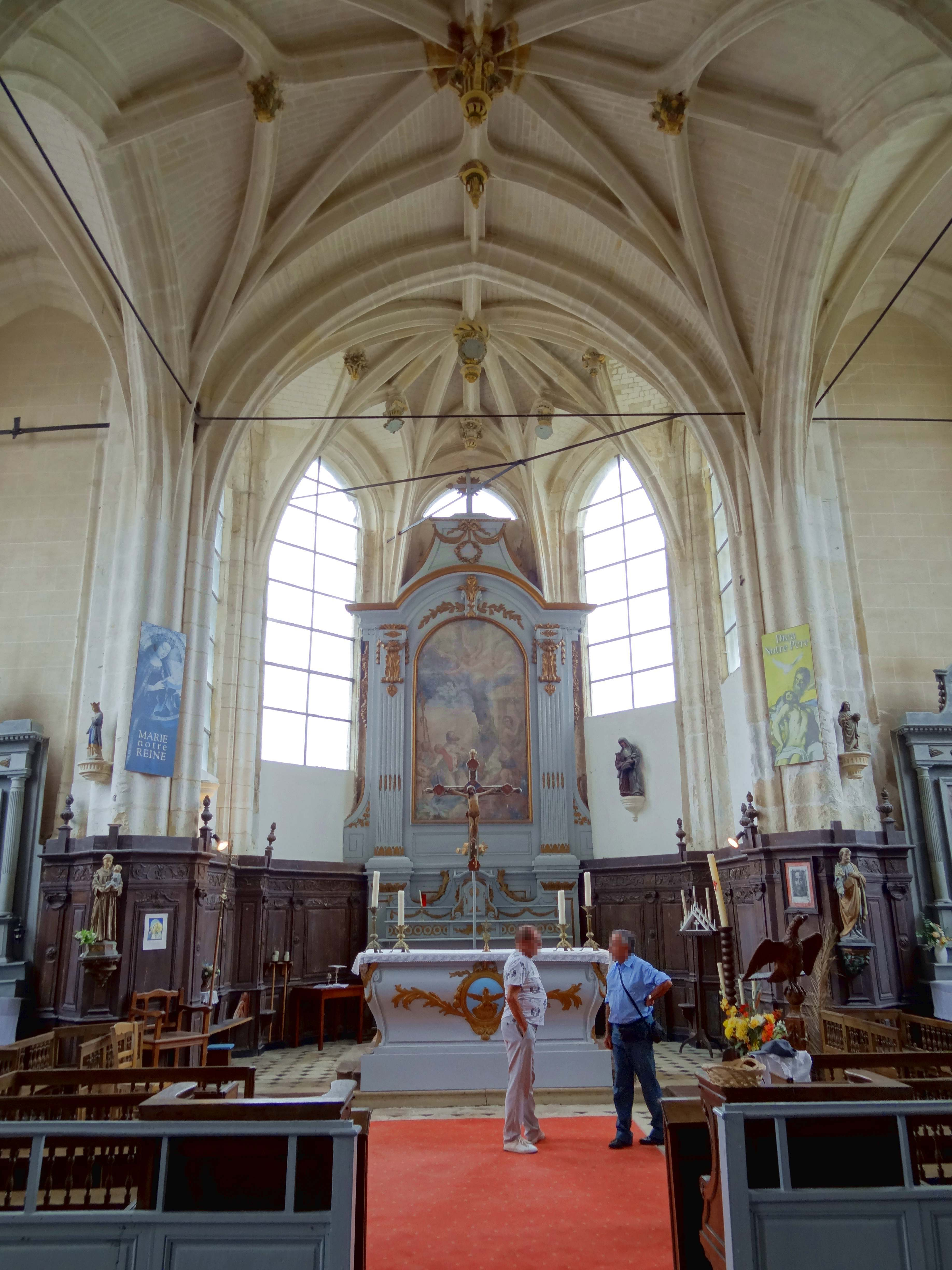 Intérieur de l'église - voir titre.